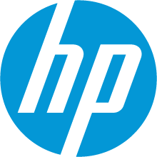 Hewlett-Packard